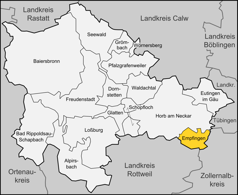 Karte der Gemeinde Empfingen im Landkreises Freudenstadt